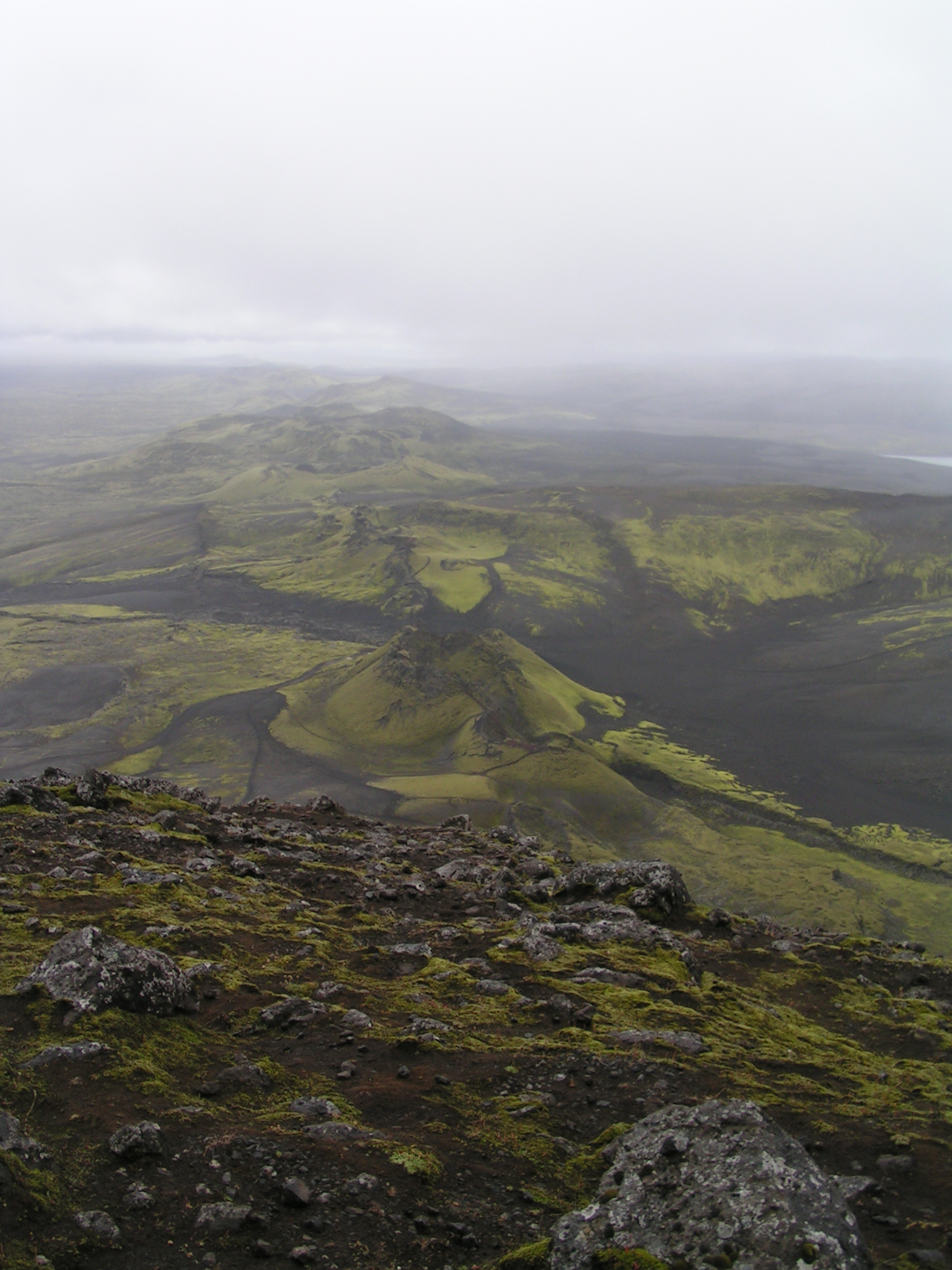 Foto gemaakt door Hans Oosting.